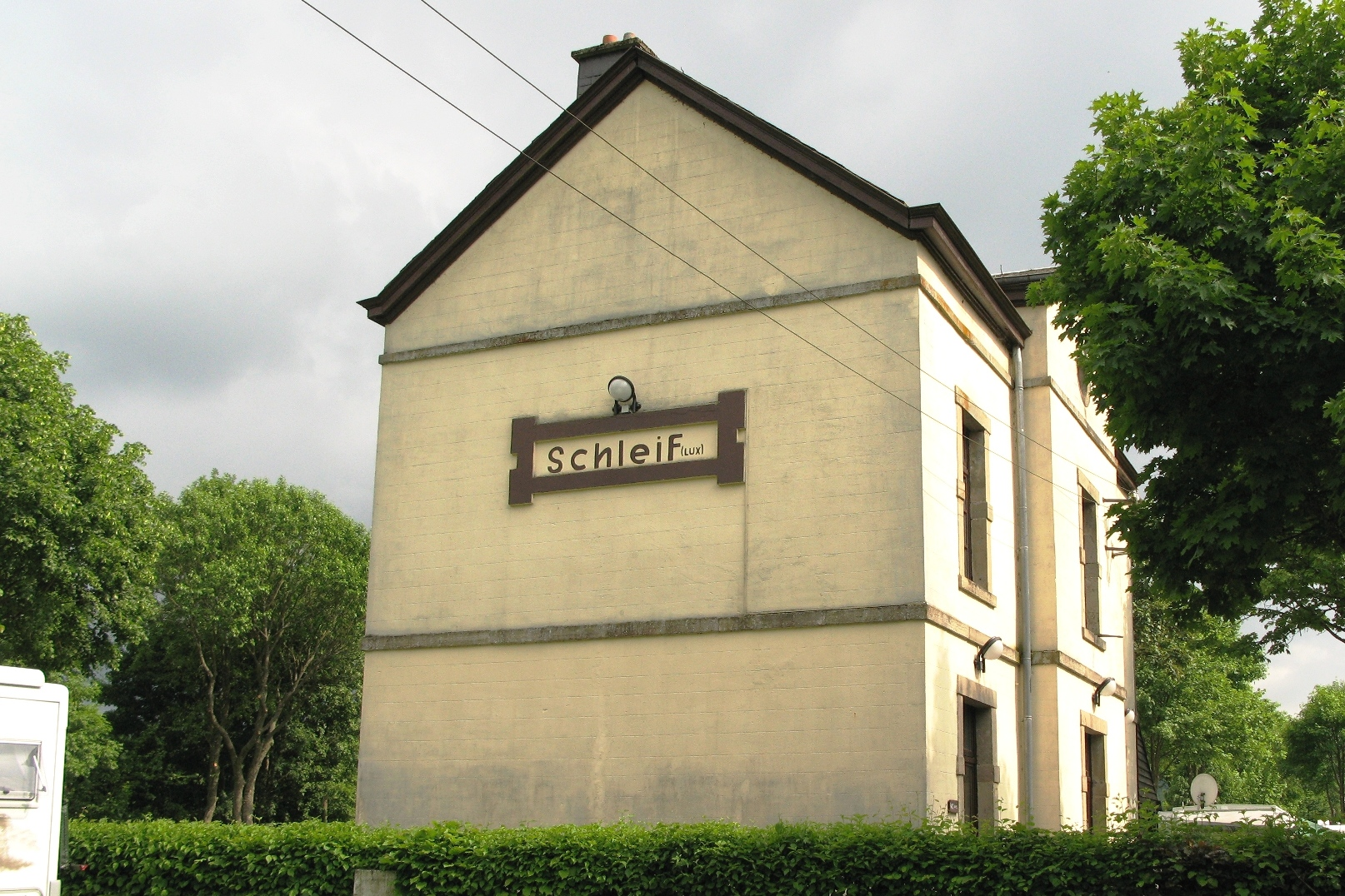 D'Gare an der Schleef am Mee 2008.